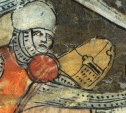 Bataille